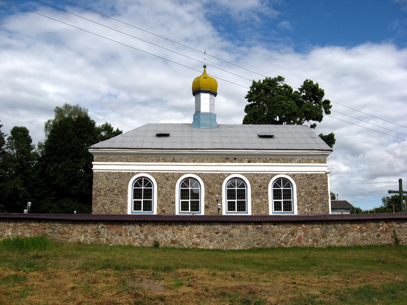 Накрышкі. Царква Святых мучанікаў благаверных князёў Барыса і Глеба